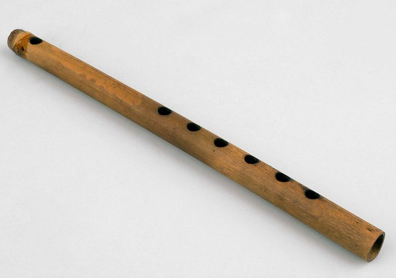 Blaasinstrument. Dwarsfluit van bamboe met zes vingergaten Unknown language: Soeling